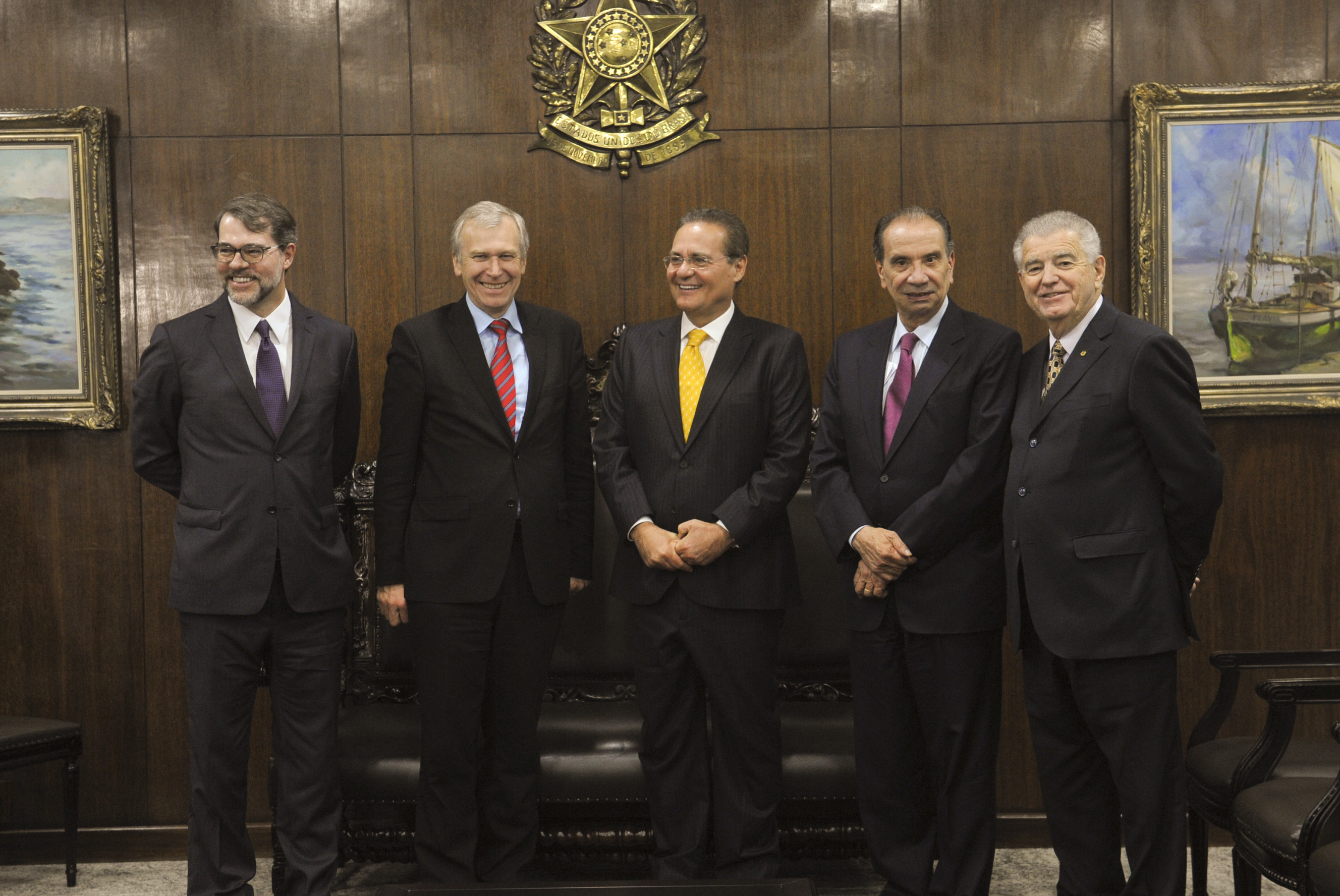 O presidente do Senado Federal, senador Renan Calheiros (PMDB-AL), recebe o senador Aloysio Nunes Ferreira (PSDB-SP) acompanhado do presidente do Tribunal Superior Eleitoral (TSE), ministro Dias Toffoli, do secretário-geral do Instituto para a Democracia e a Assistência Eleitoral (Idea), Yves Leterme e do diretor-geral do Idea para a América Central e Caribe, Daniel Zovatto. Foto: Jane de Araujo/Agência Senado